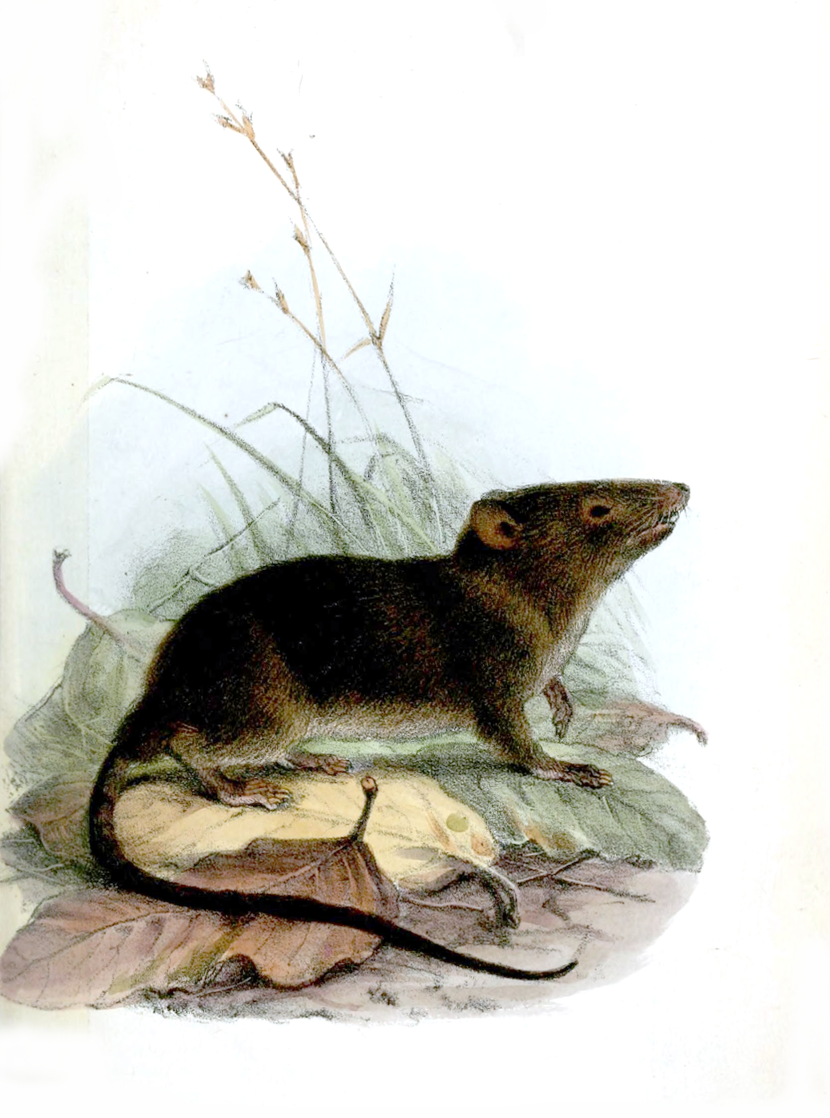 Hyracodon fuliginosus = Caenolestes fuliginosus